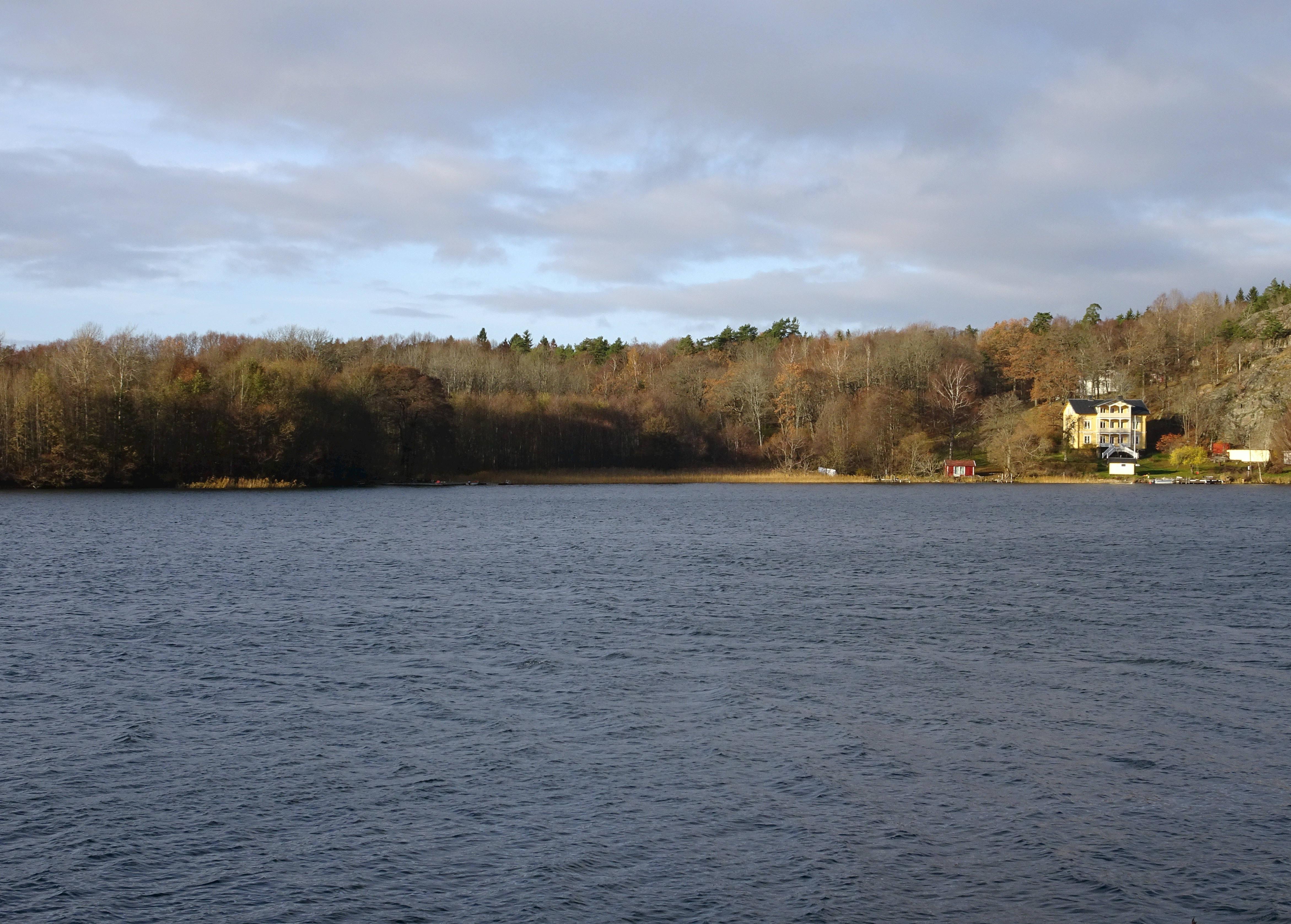 Kungshatt, platsen för tegelbruket, Villa "Eriksberg" till höger.